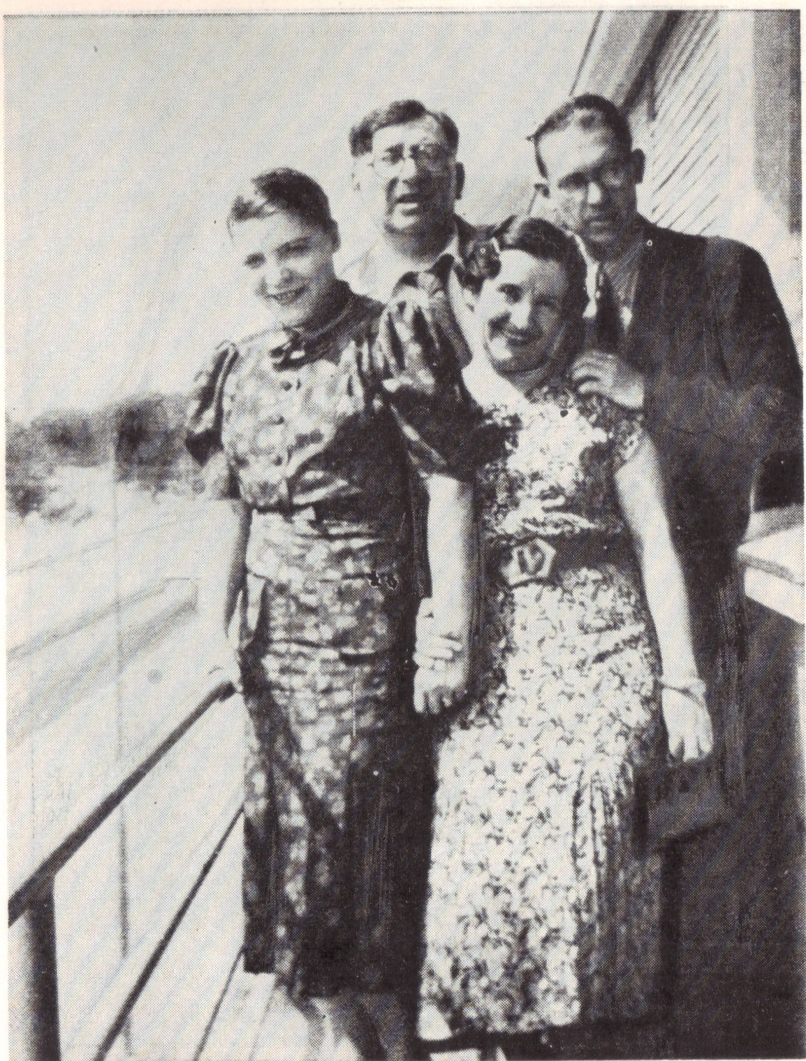 Poetul Ion Minulescu și criticul literar Octav Șuluțiu cu soțiile la Predeal, 1940.